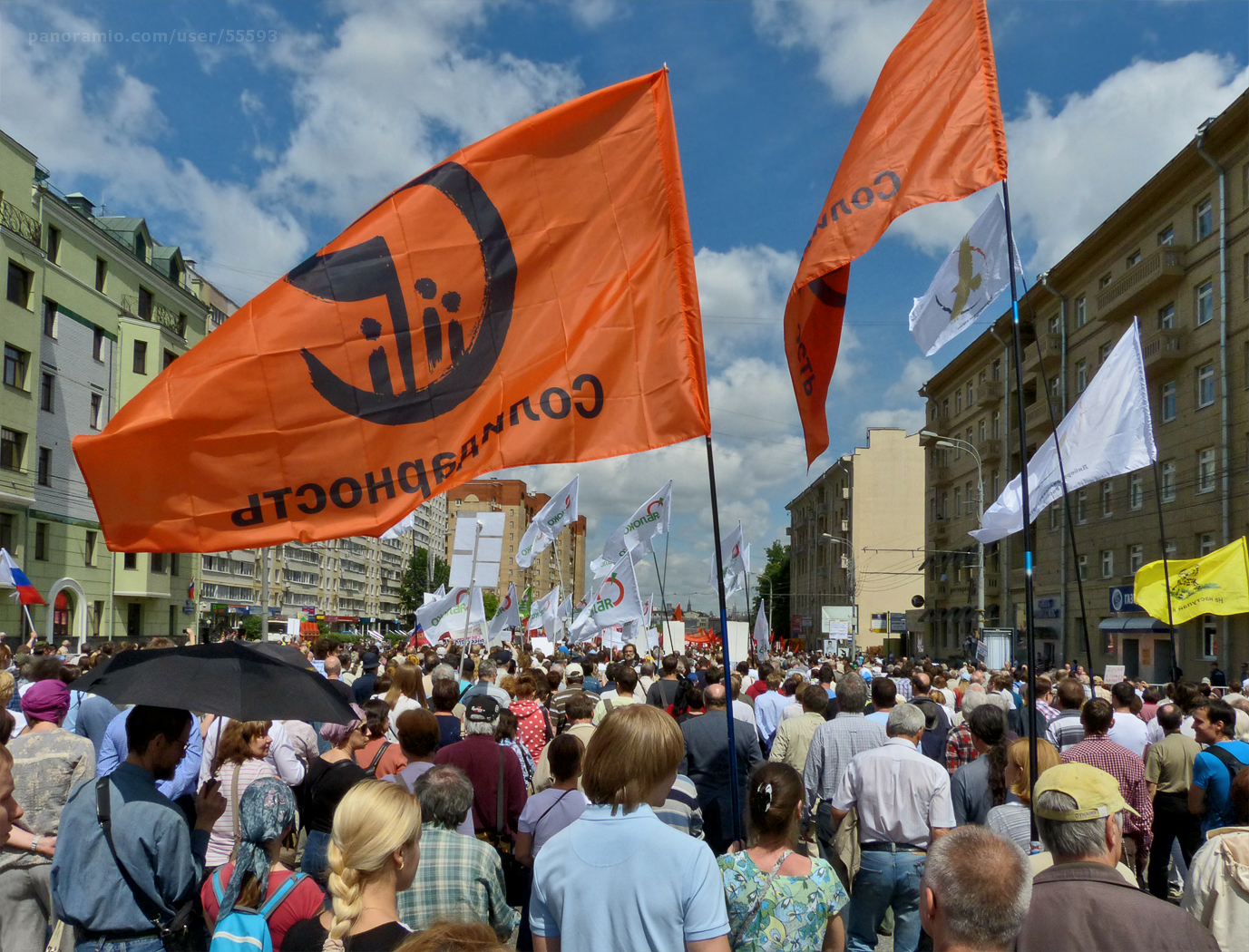 Антипутинское шествие 12 июня 2013 года в Москве.